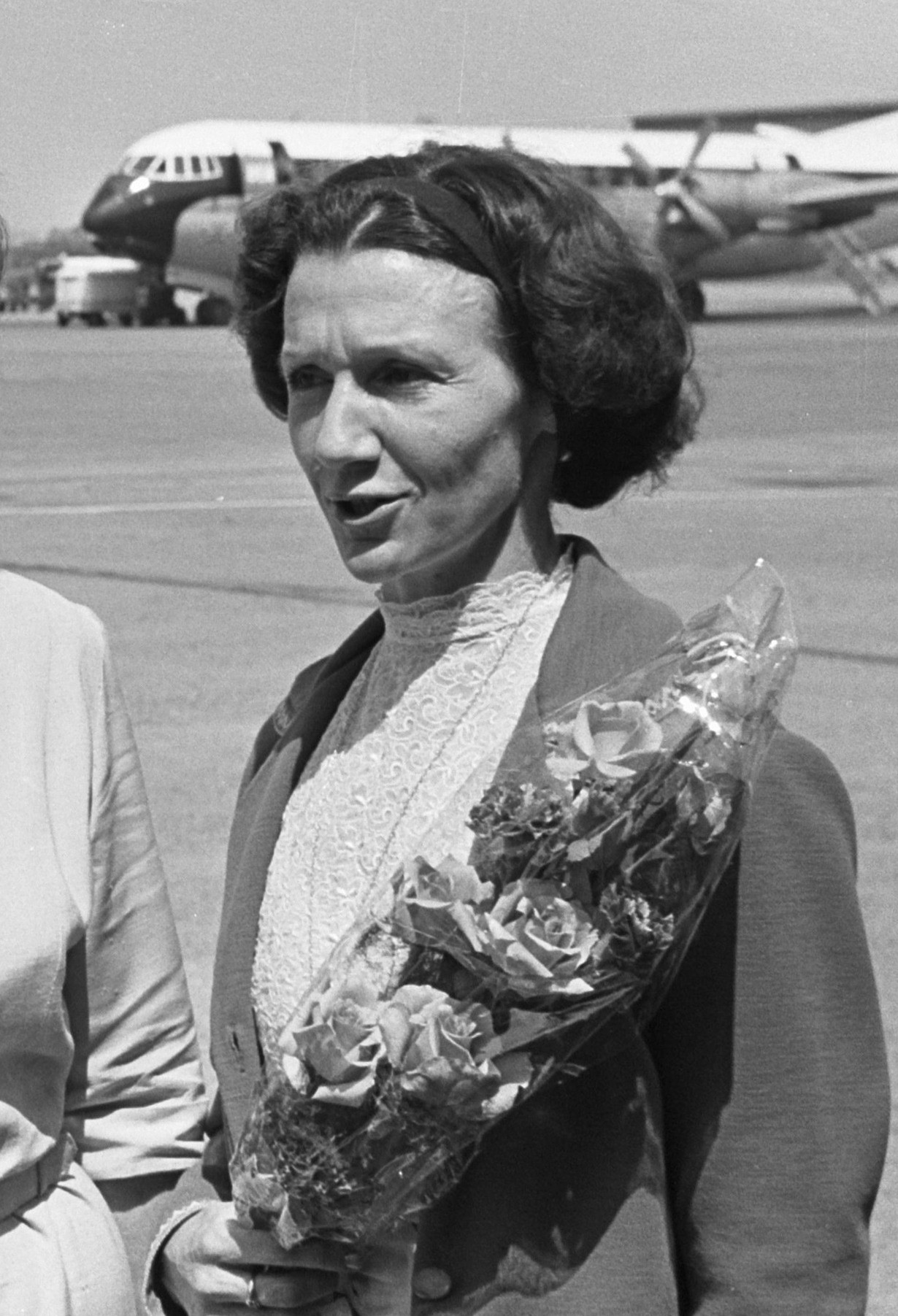 Aankomst Violetta Bovt op Schiphol